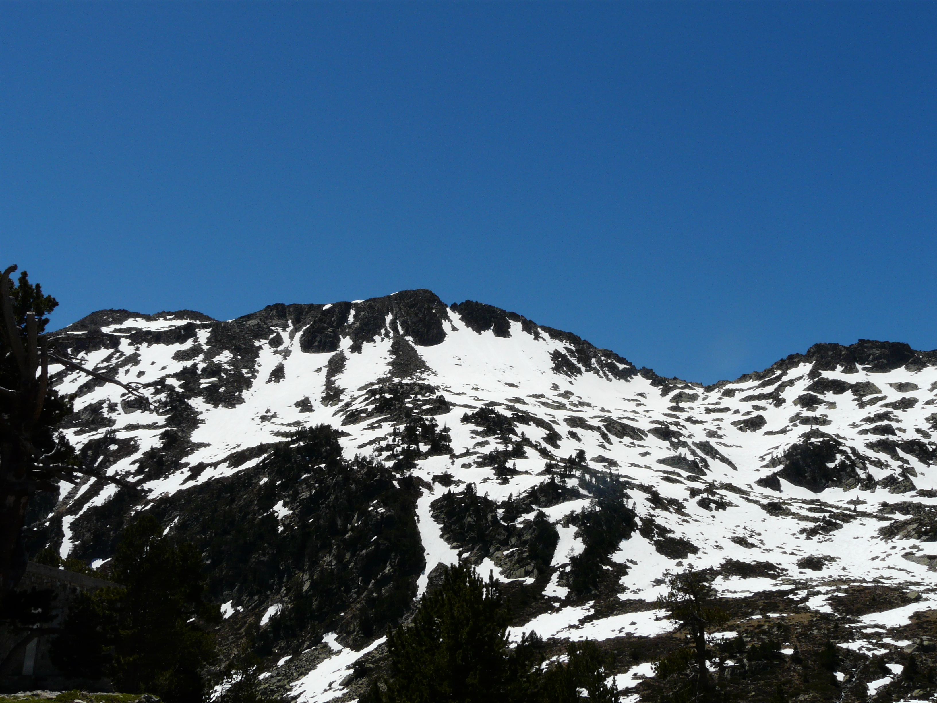 Le pic de Hèche Castet (2 568 m) au sud du lac d'Aubert, Saint-Lary-Soulan, Hautes-Pyrénées, France. Vue prise depuis le lac d'Aubert.